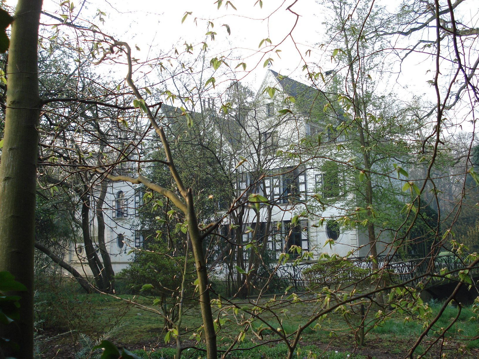 Façade arrière du château Missembourg (Mussenborg), à Edegem, près d'Anvers, où Marie Gevers vécut toute sa vie. Vue prise de la voie publique (désolé, nous n'avons pu faire mieux).